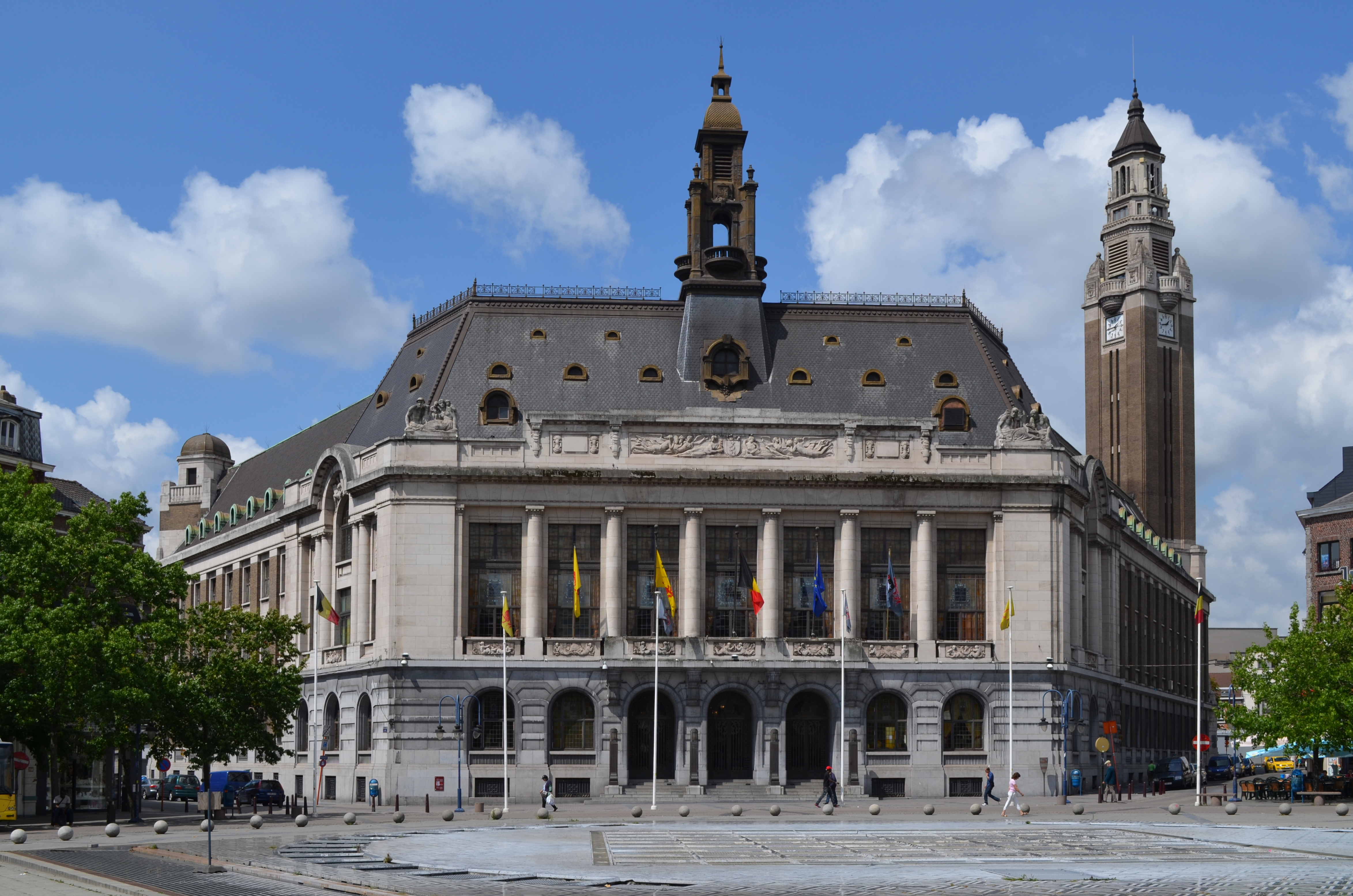 Charleroi - hôtel de ville vu de la place Charles II - 2014-08-07